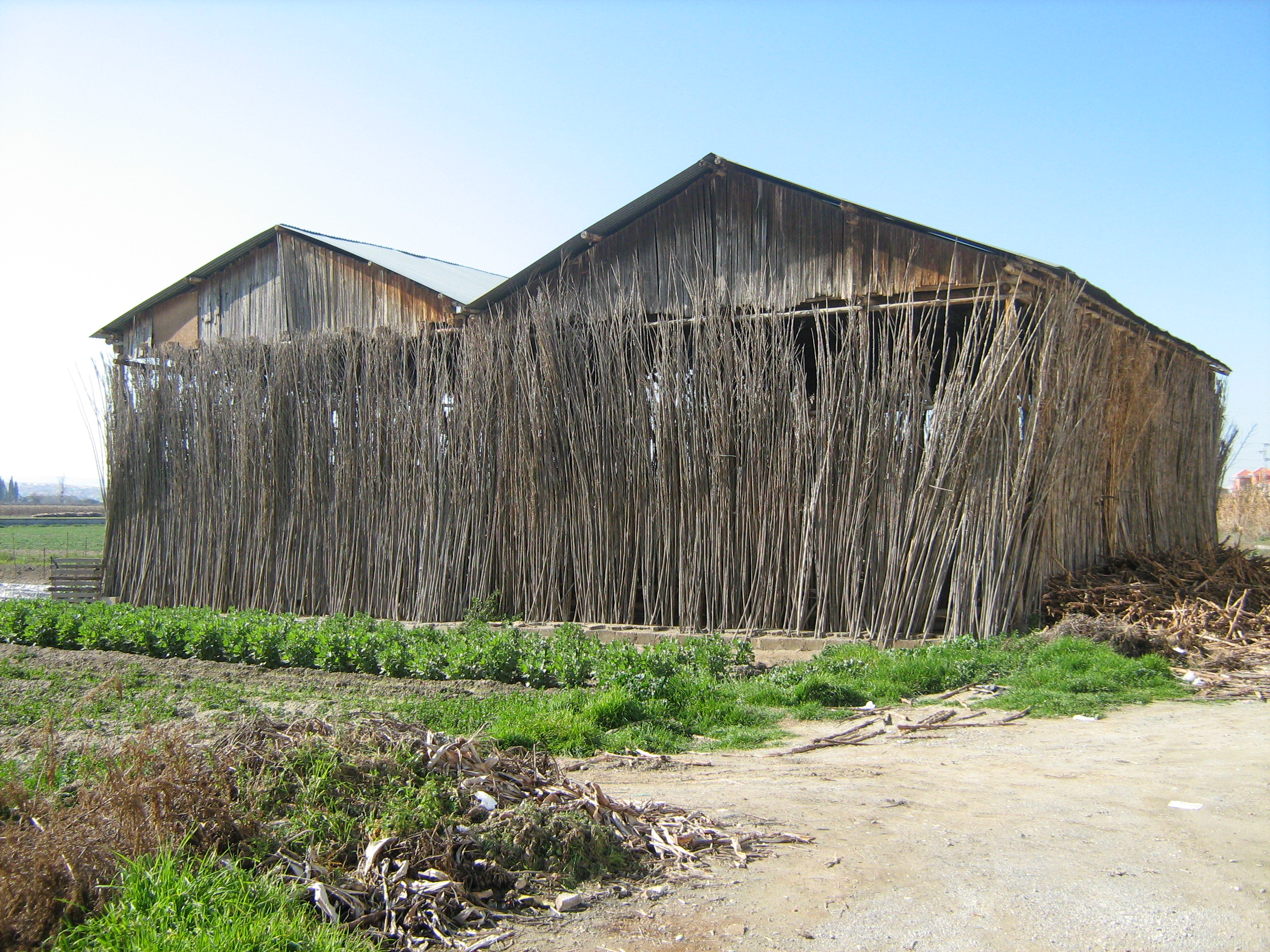 Secadero de tabaco en Purchil, Granada